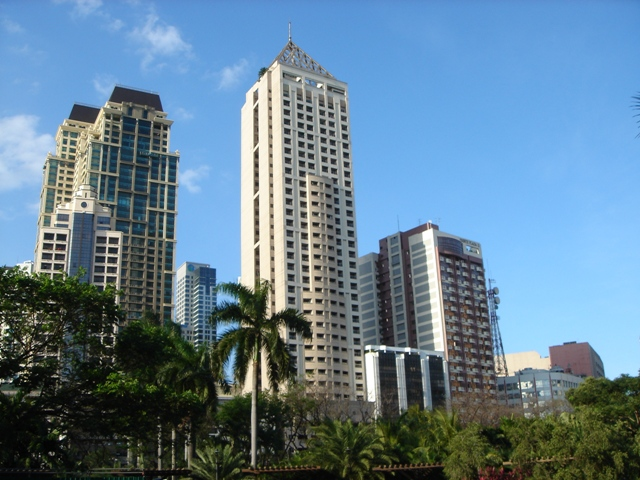 MakatiManila.jpg